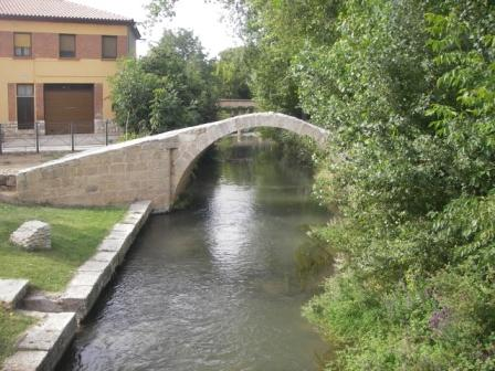 Puente romano de Calamocha